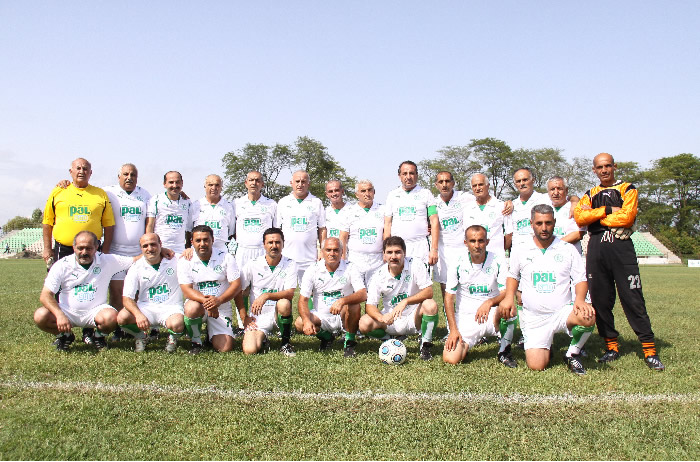 "Xəzər Lənkəran"ın veteranları